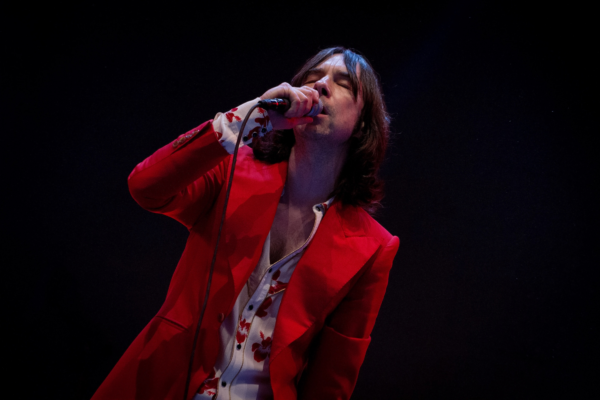 Bobby Gillespie en REC